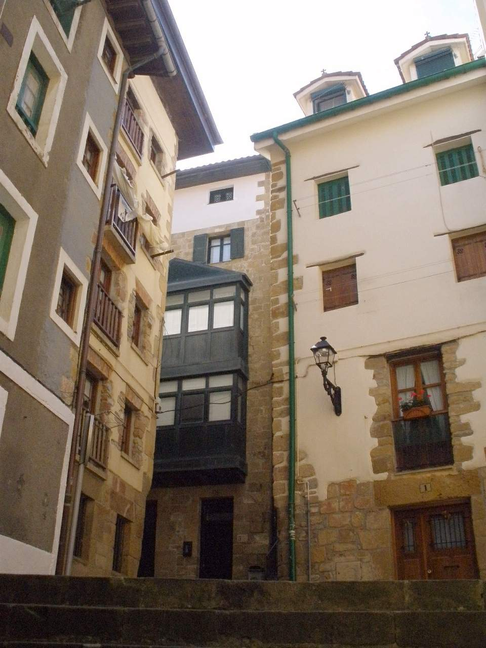 Getaria (Gipúzkoa)